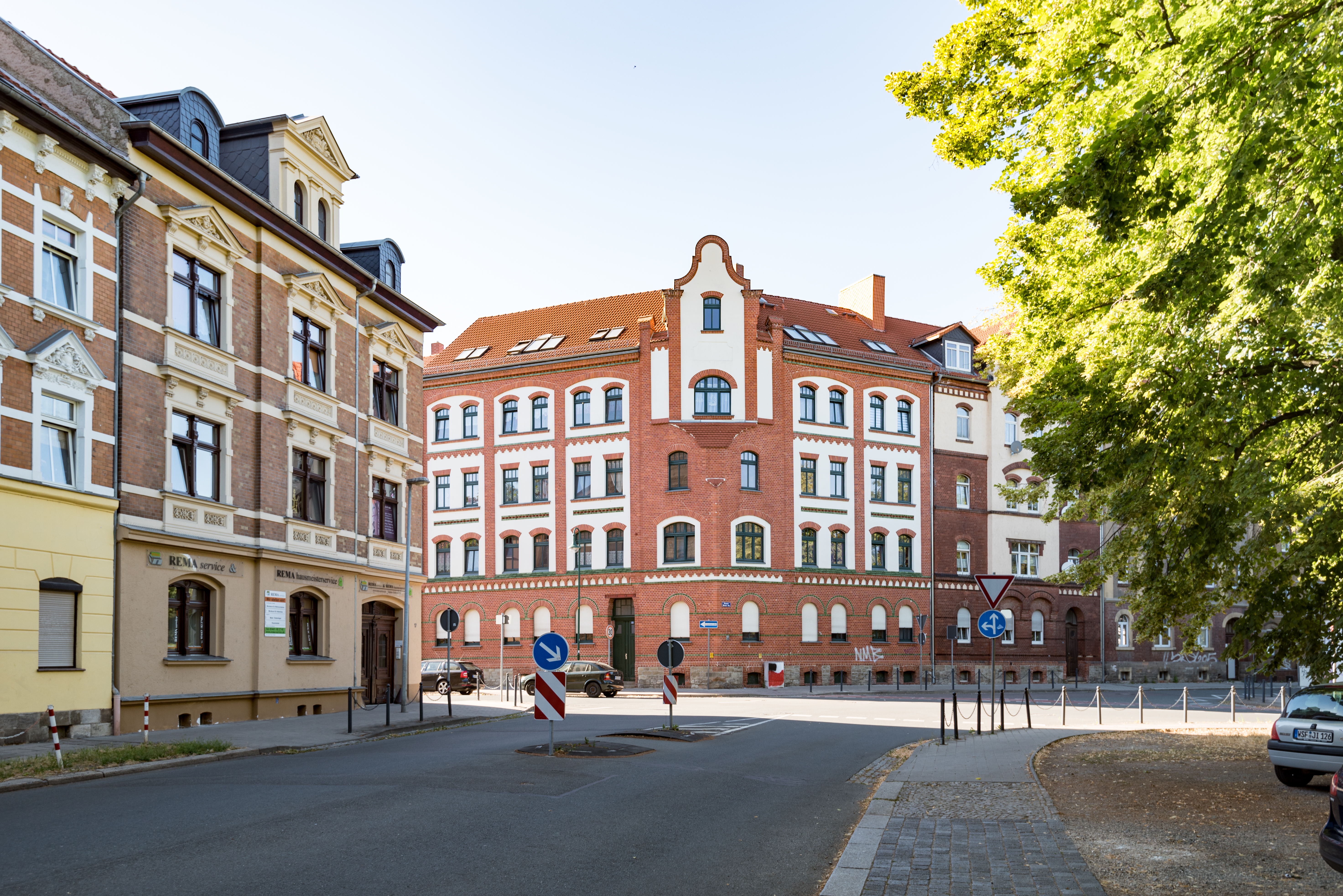 Weißenfels, Leopold-Kell-Straße 55